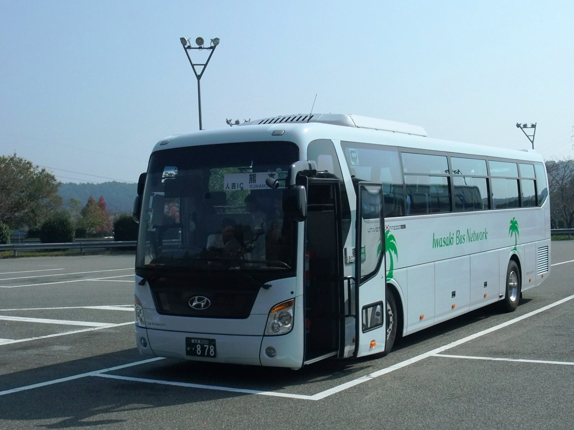 現代自動車・ユニバースのバス車両（いわさきバスネットワーク、鹿児島200 か 878）